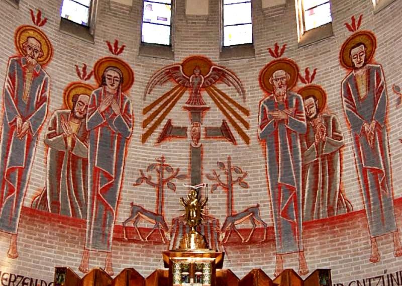 Nürnberg-Mögeldorf, St. Karl Borromäus, Chorausmalung von Paul Thalheimer, 1927